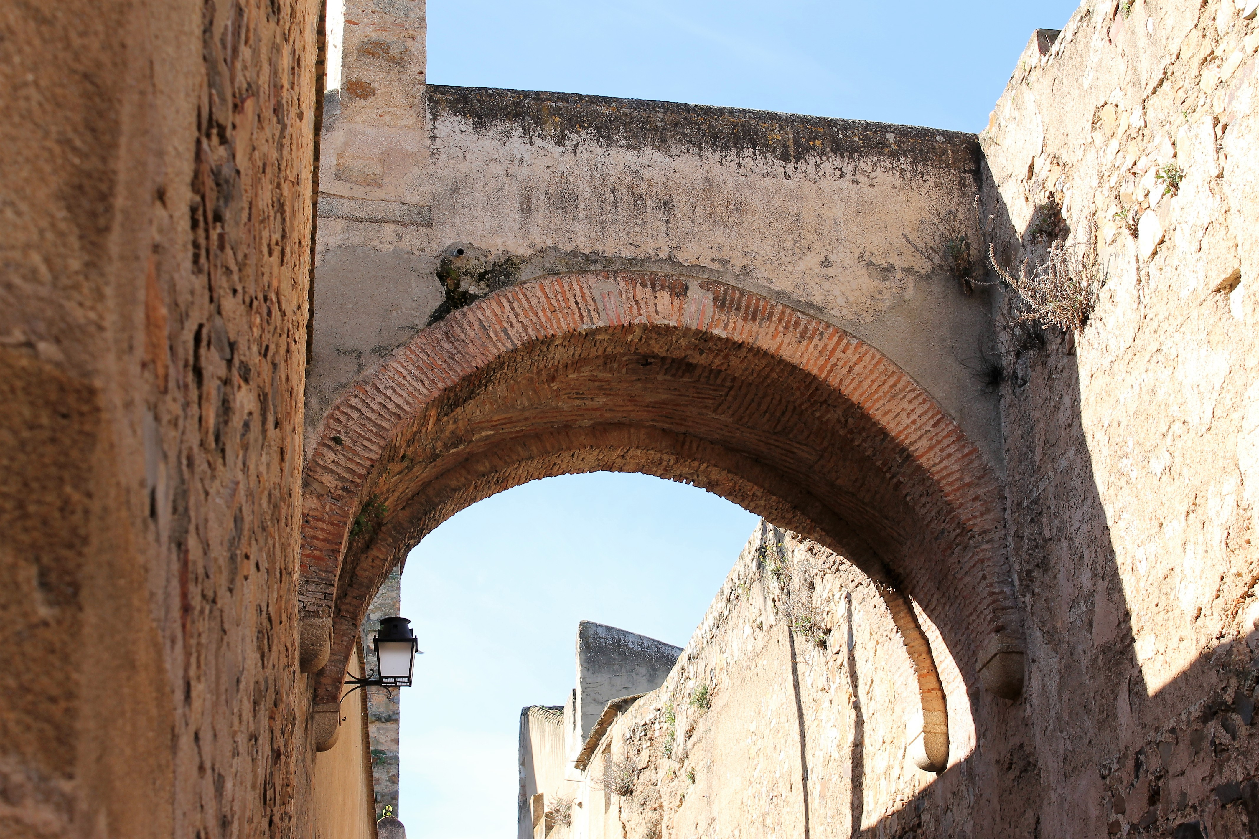 arco del adarve, siglo XVIII Cáceres